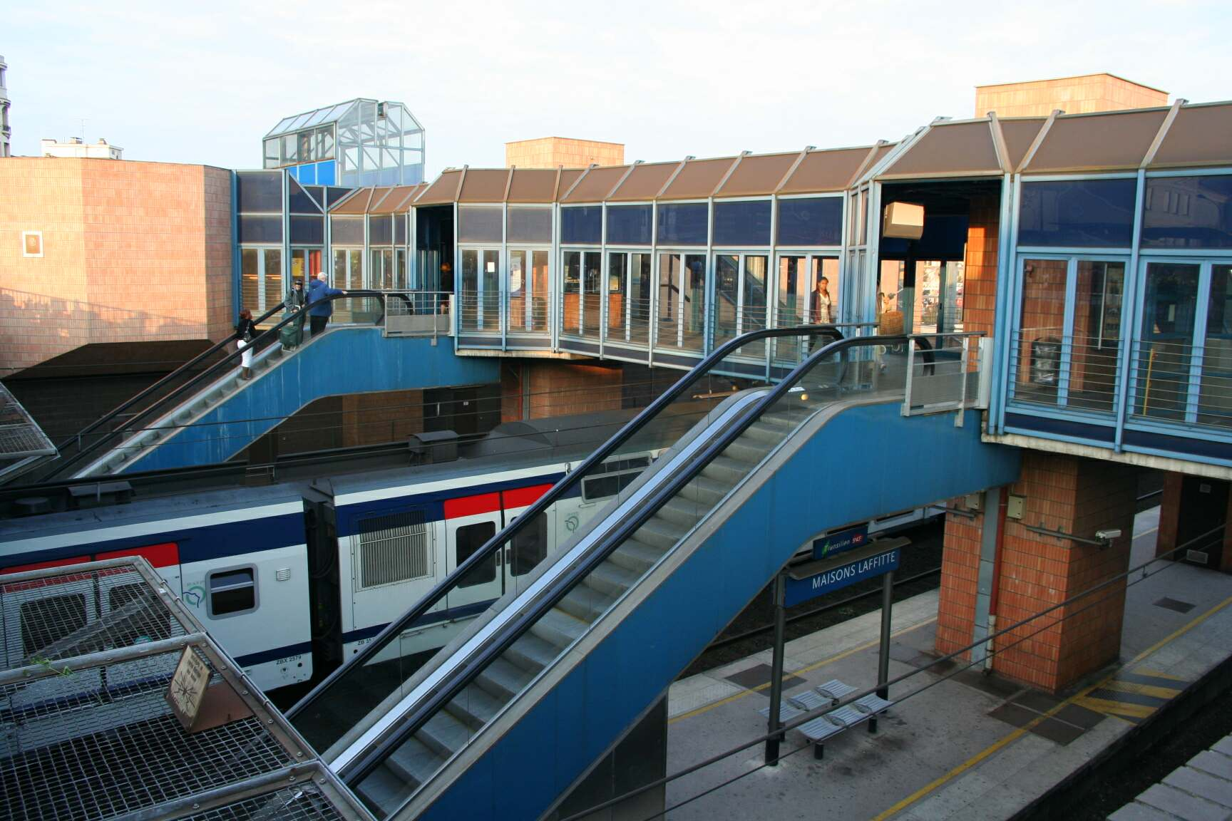 Gare de Maisons-Laffitte - Yvelines (France)